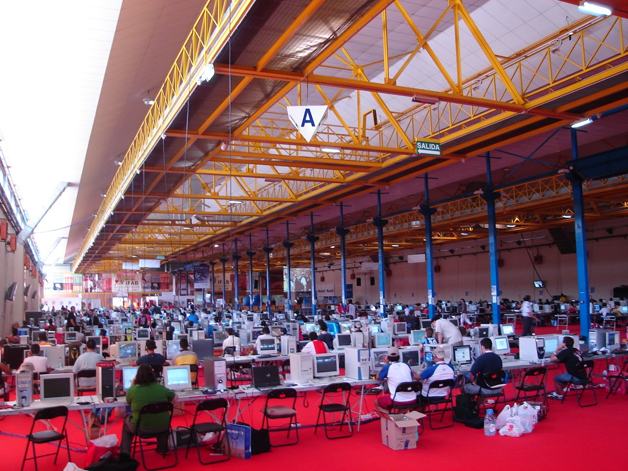 Panorámica de Party Quijote 2005